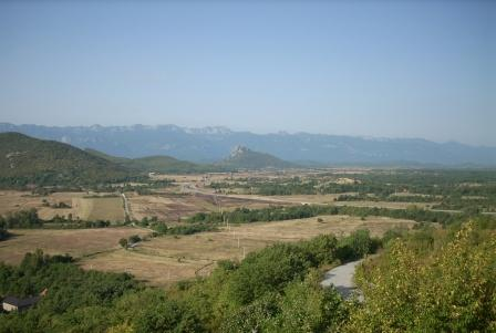 Gornja Ploča.